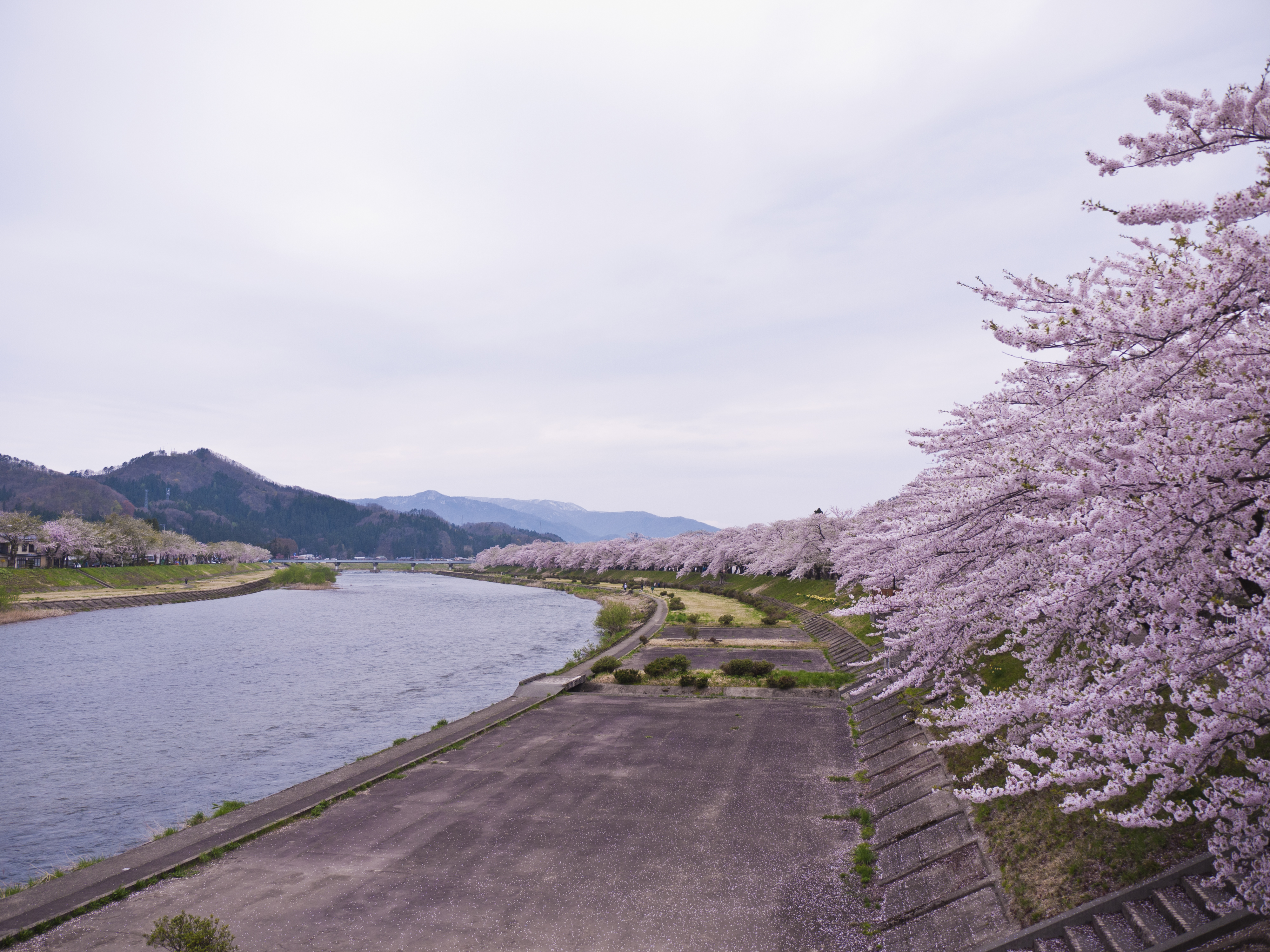 桧木内川 さくらの季節